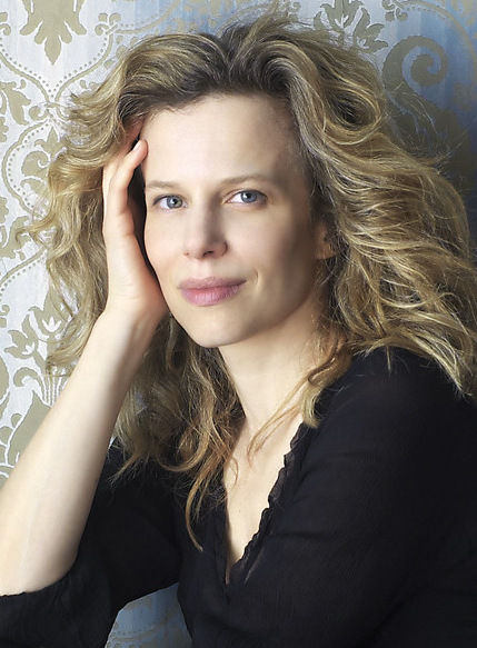 Соня Бергамаско, італійська акторка